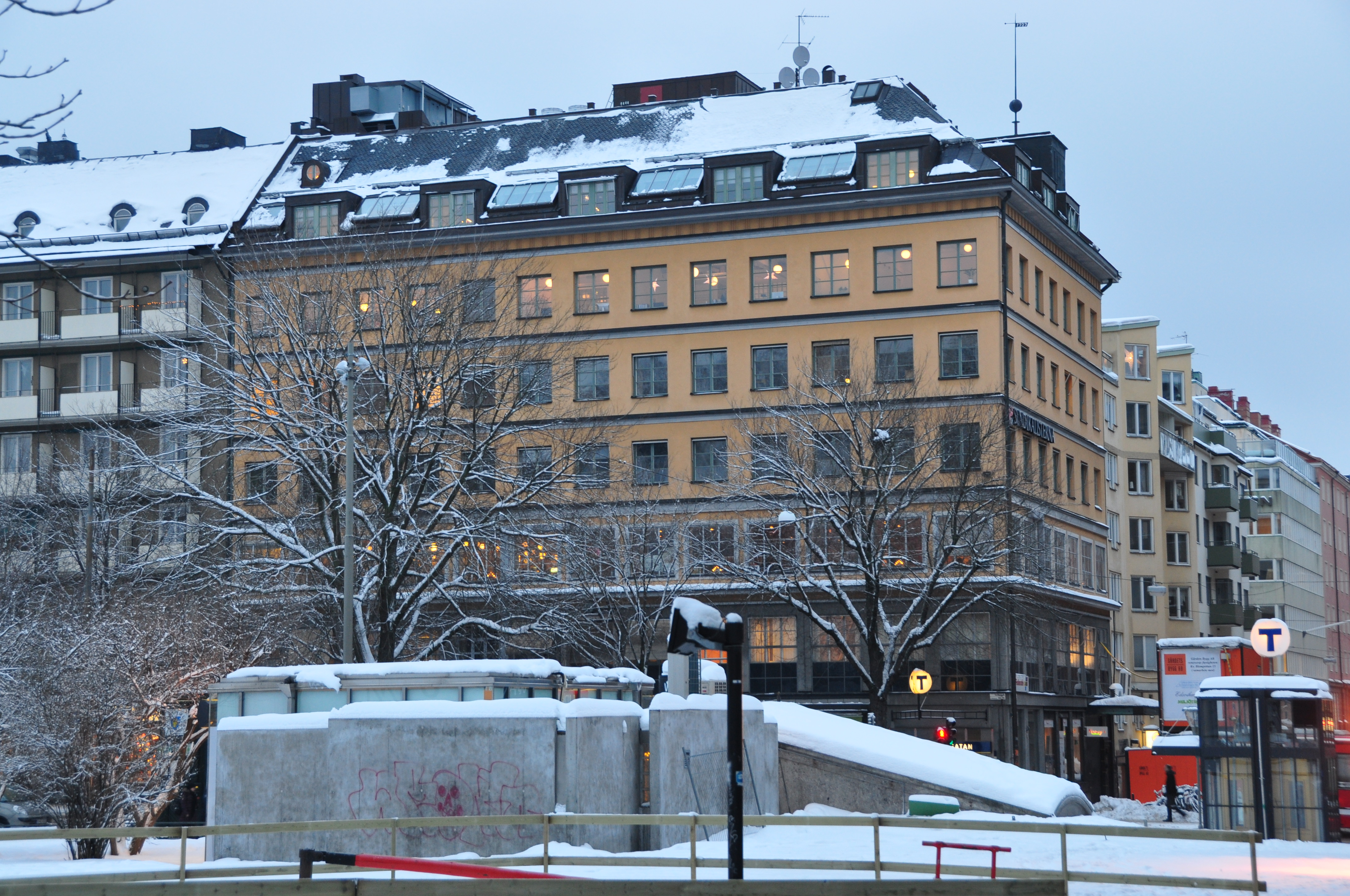 Sveavägen 98, Byggnadsår 1928 -31, arkitekt Björn Hedvall, byggherre Bröderna Lindströms Förlag